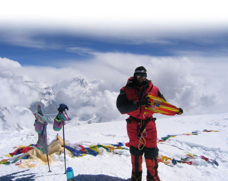 Carlos Pauner en la ascensión del Chooyu